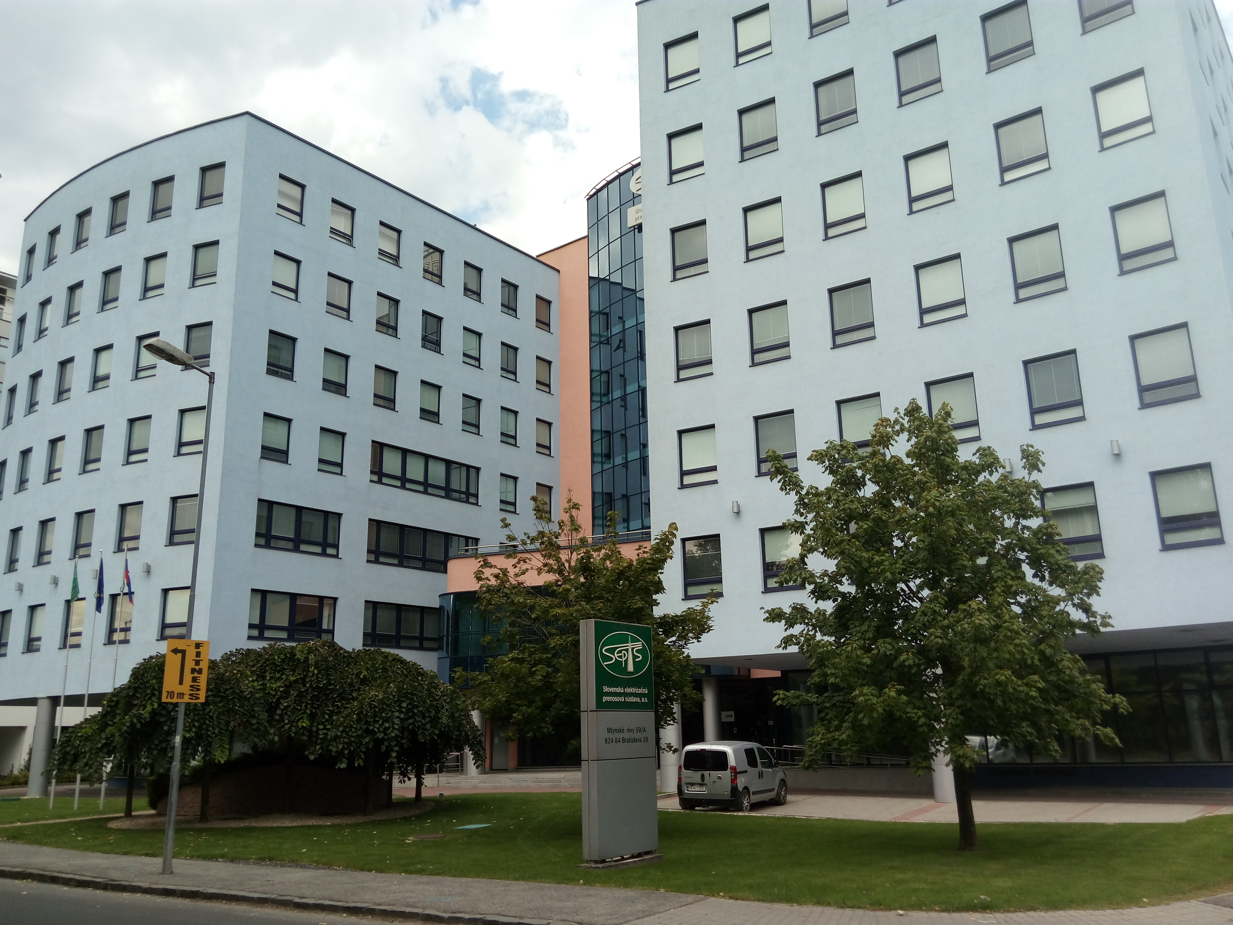 Mlynské nivy 59/A, Ružinov, Bratislava